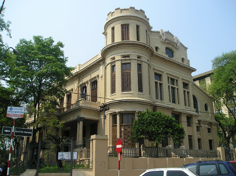 Sede del Tribunal Permanente de Revisión del Mercosur. Asunción. Paraguay